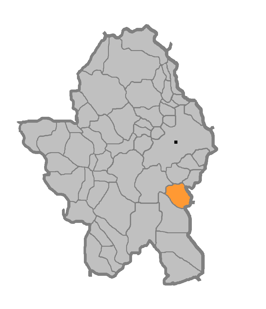 Мјесна заједница Љубачево